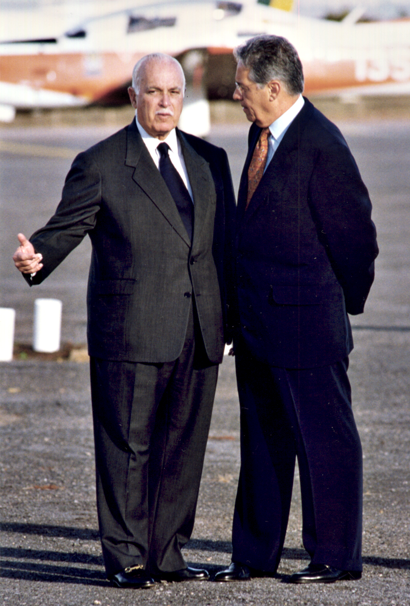 Em 16 de maio de 1998, Antônio Carlos Magalhães com o presidente Fernando Henrique Cardoso, em aeroporto de Brasília.